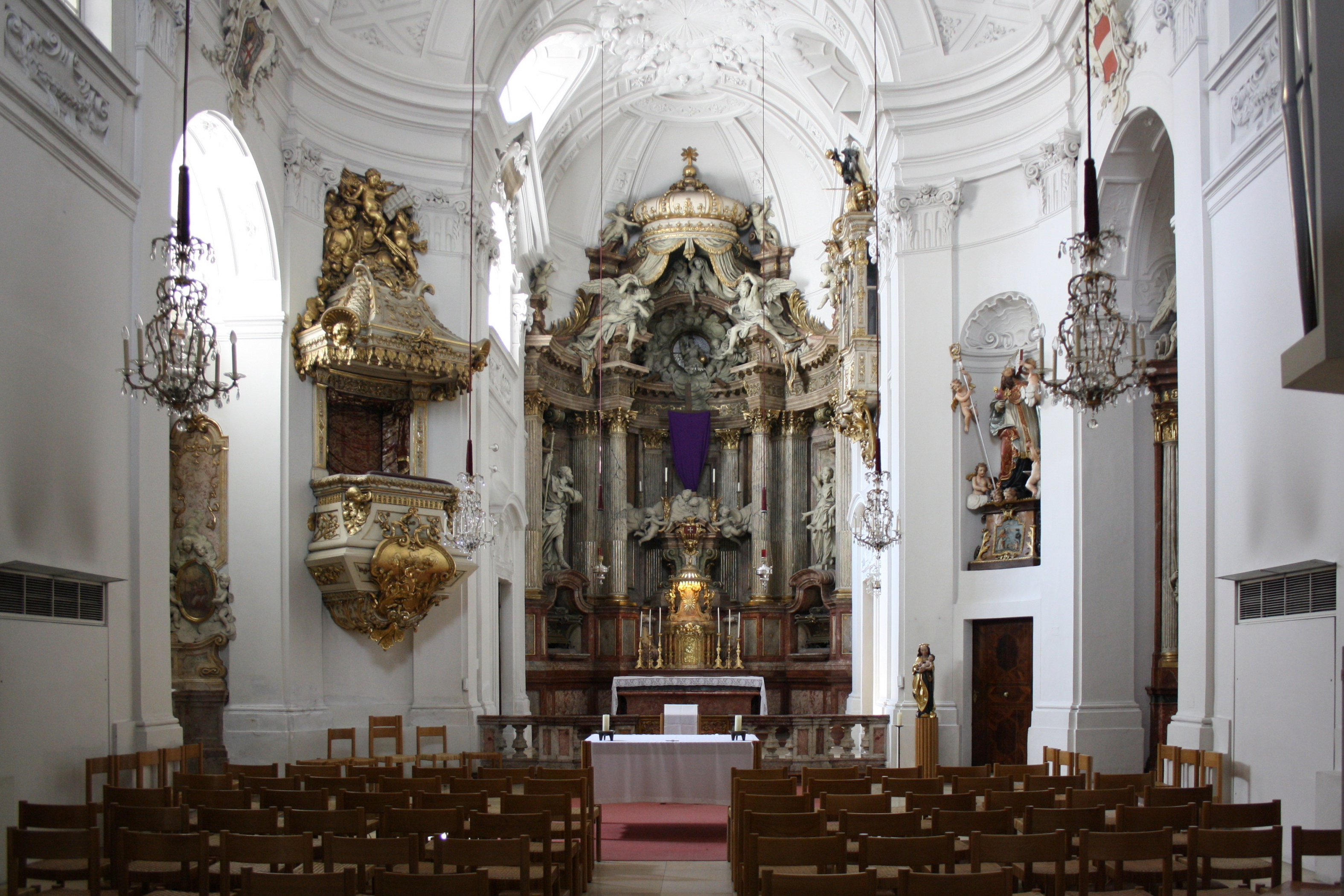 Innenansicht der Seminarkirche "Santa Maria de Mercede" im ehemaligen Spanischen Spital.